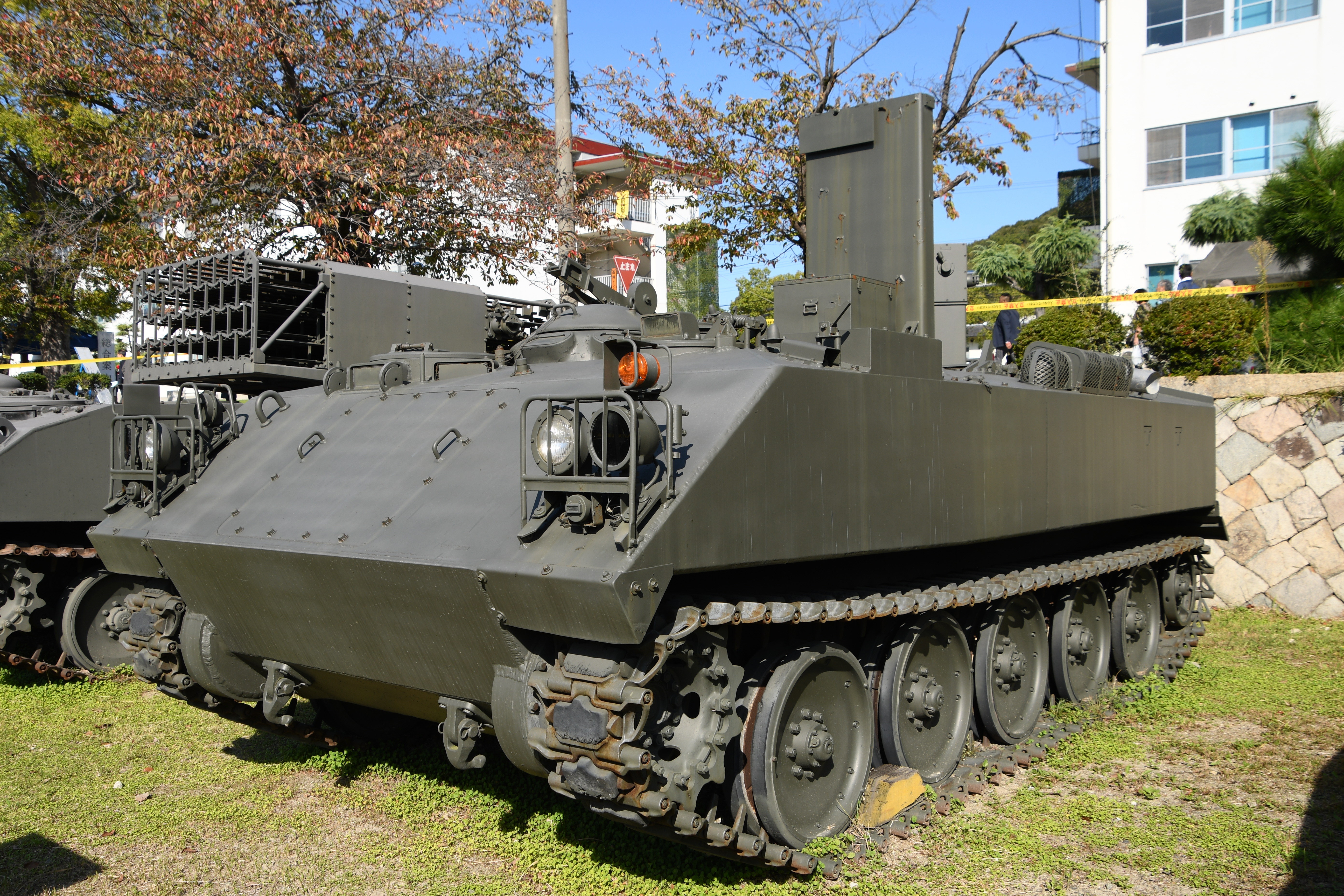 陸上自衛隊 75式自走地上風測定装置（製造番号：KU130A-0012A号車） 左前面。2018年10月21日 姫路駐屯地にて。